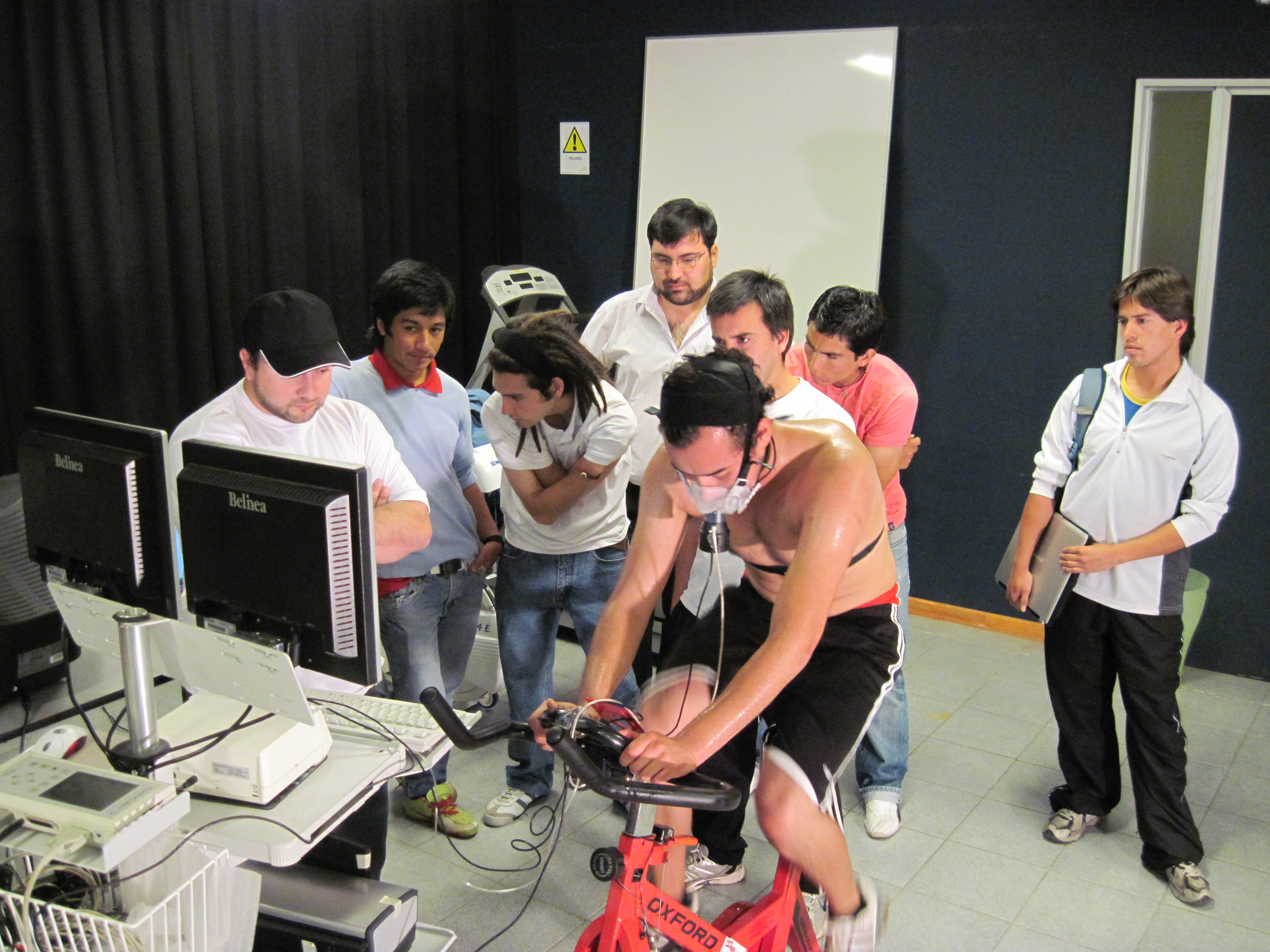 catedra de valoración de la condición física de un deportista